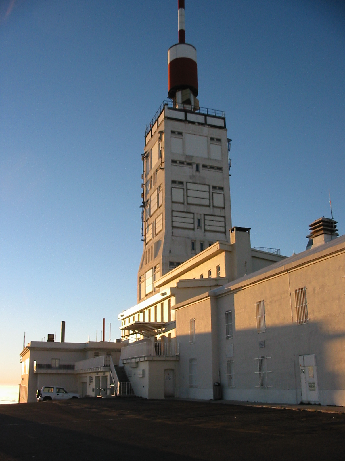 Tour située au sommet du Mt Ventoux auteur : pereubu